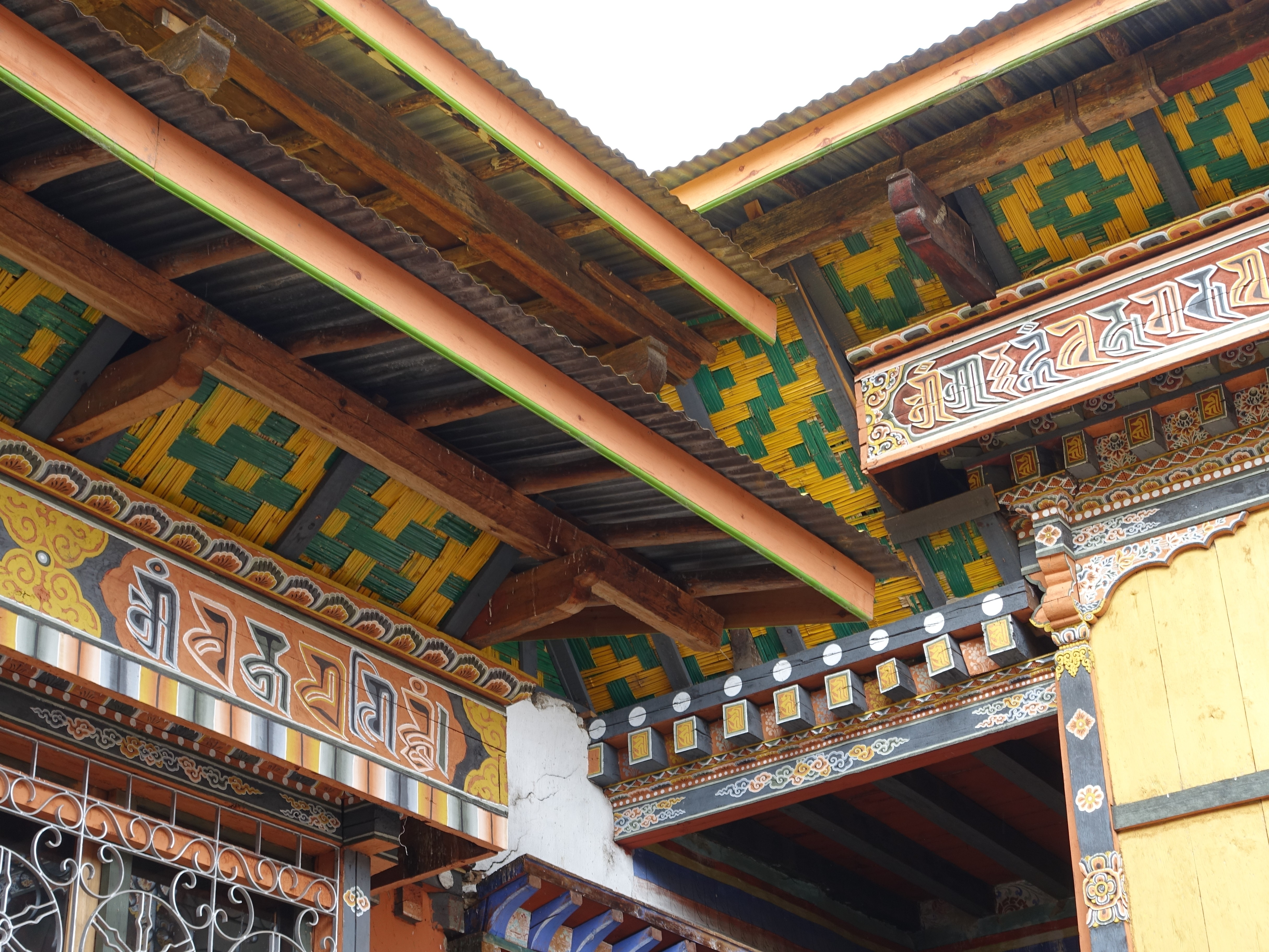 Bumthang - Kloster Tamshing 15.Jh